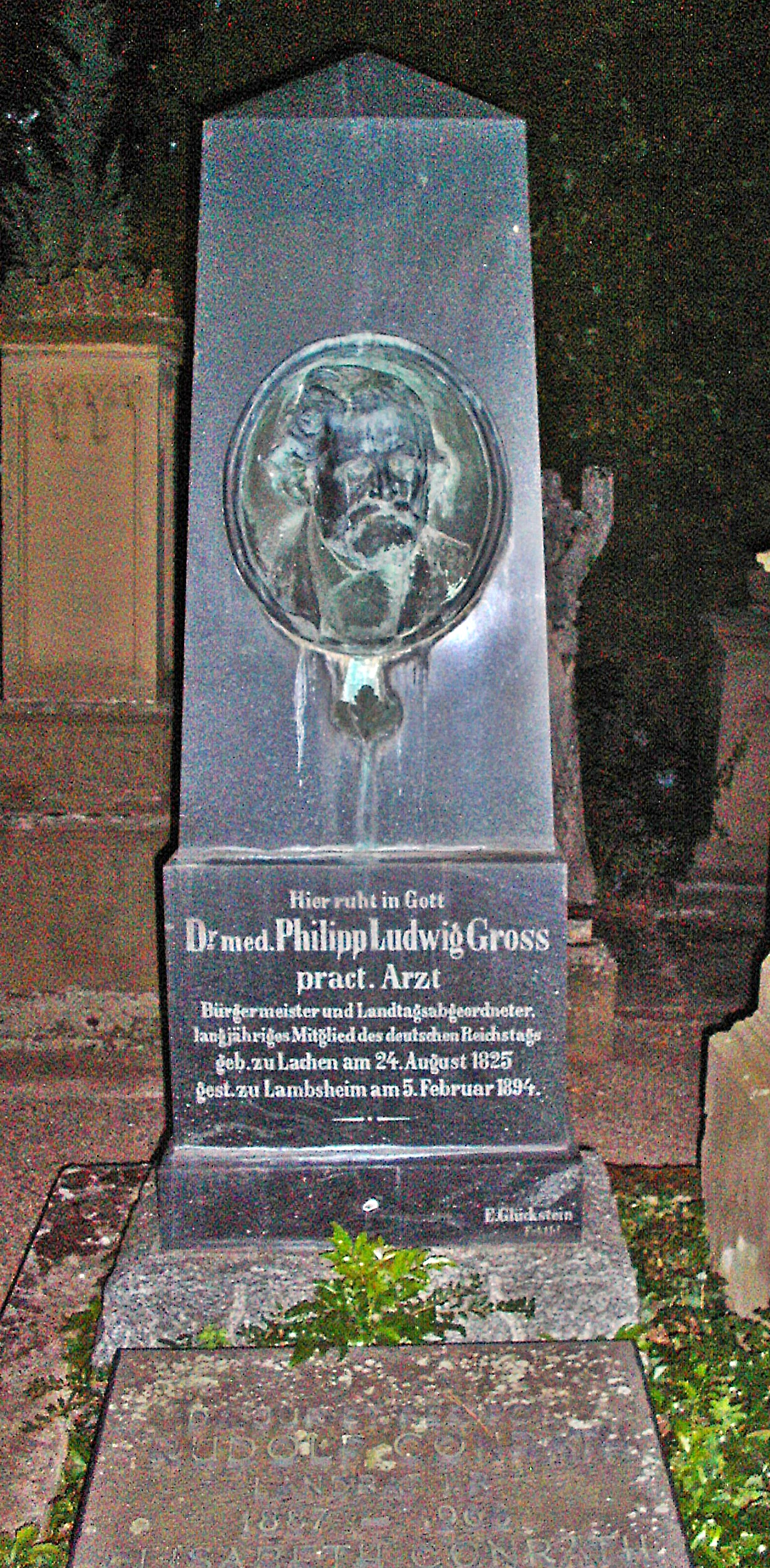 Friedhof Lambsheim, Grab von Dr. Philipp Ludwig Groß (1825-1894), Bürgermeister, Landtags- und Reichstagsabgeordneter